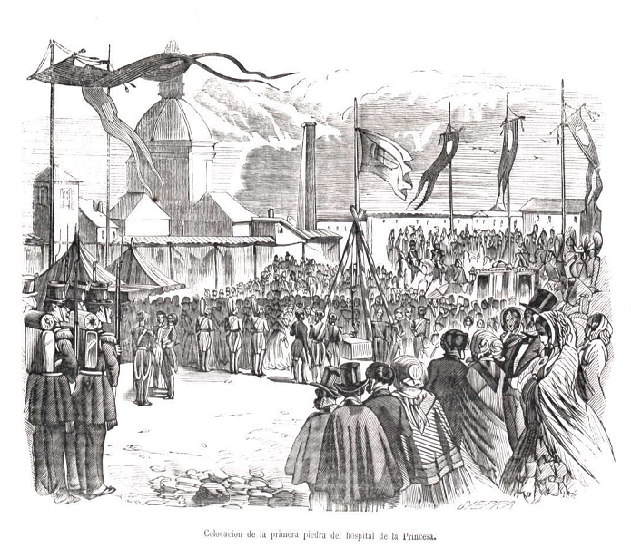 Colocación de la primera piedra del hospital de la Princesa, en la revista española La Ilustración.